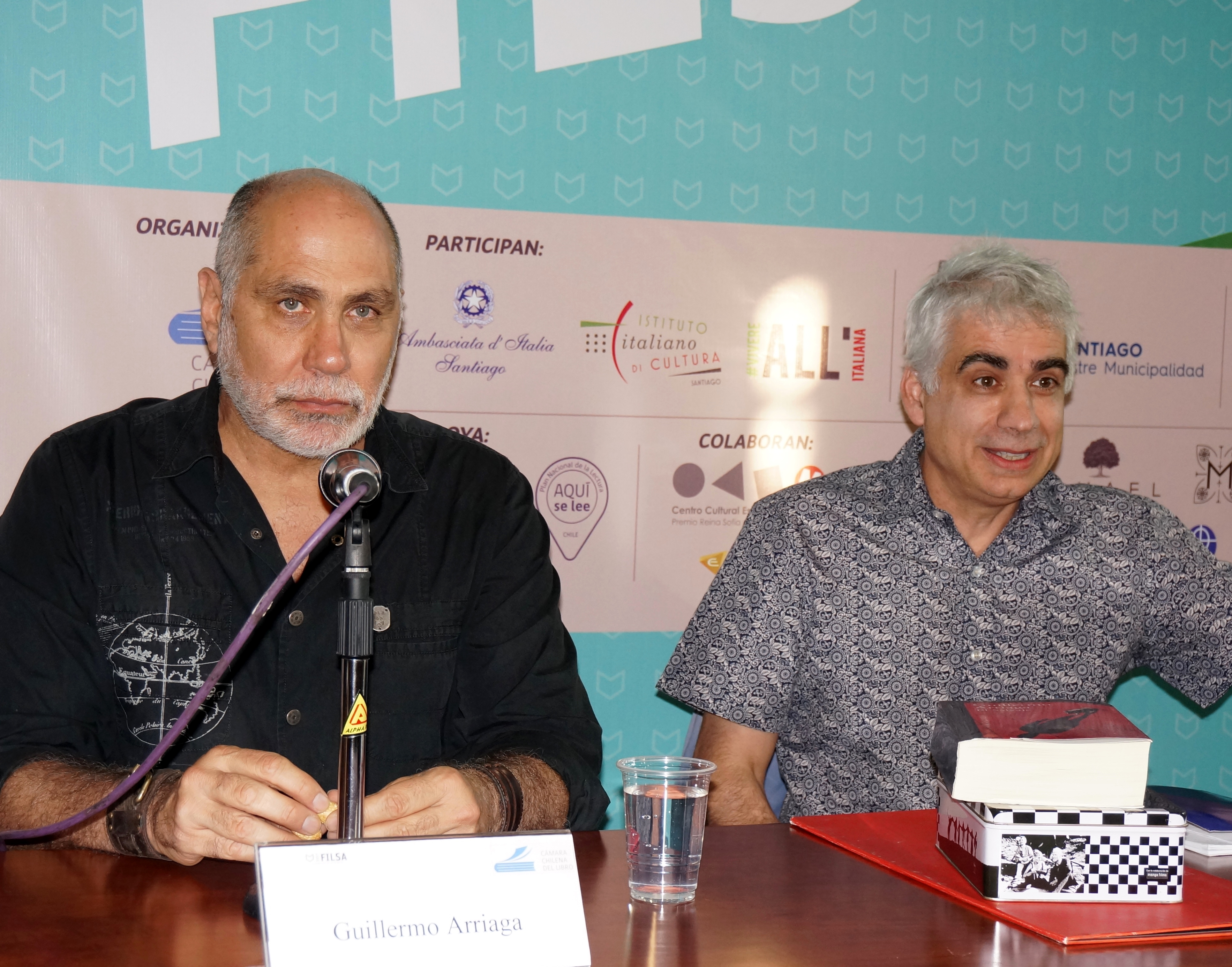 Los cineastas y escritores mexicano, Guillermo Arriaga, y chileno, Boris Quercia, durante la presentación de la novela del primero, El salvaje, en la Feria Internacional del Libro de Santiago 2017.